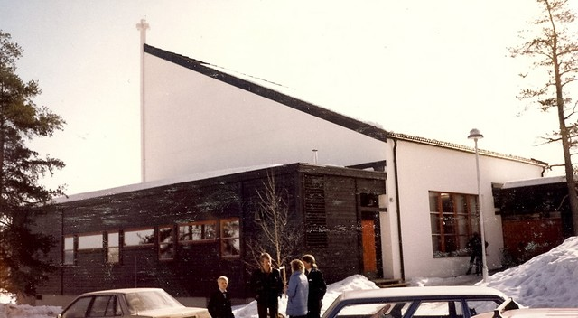 Fjell kirke